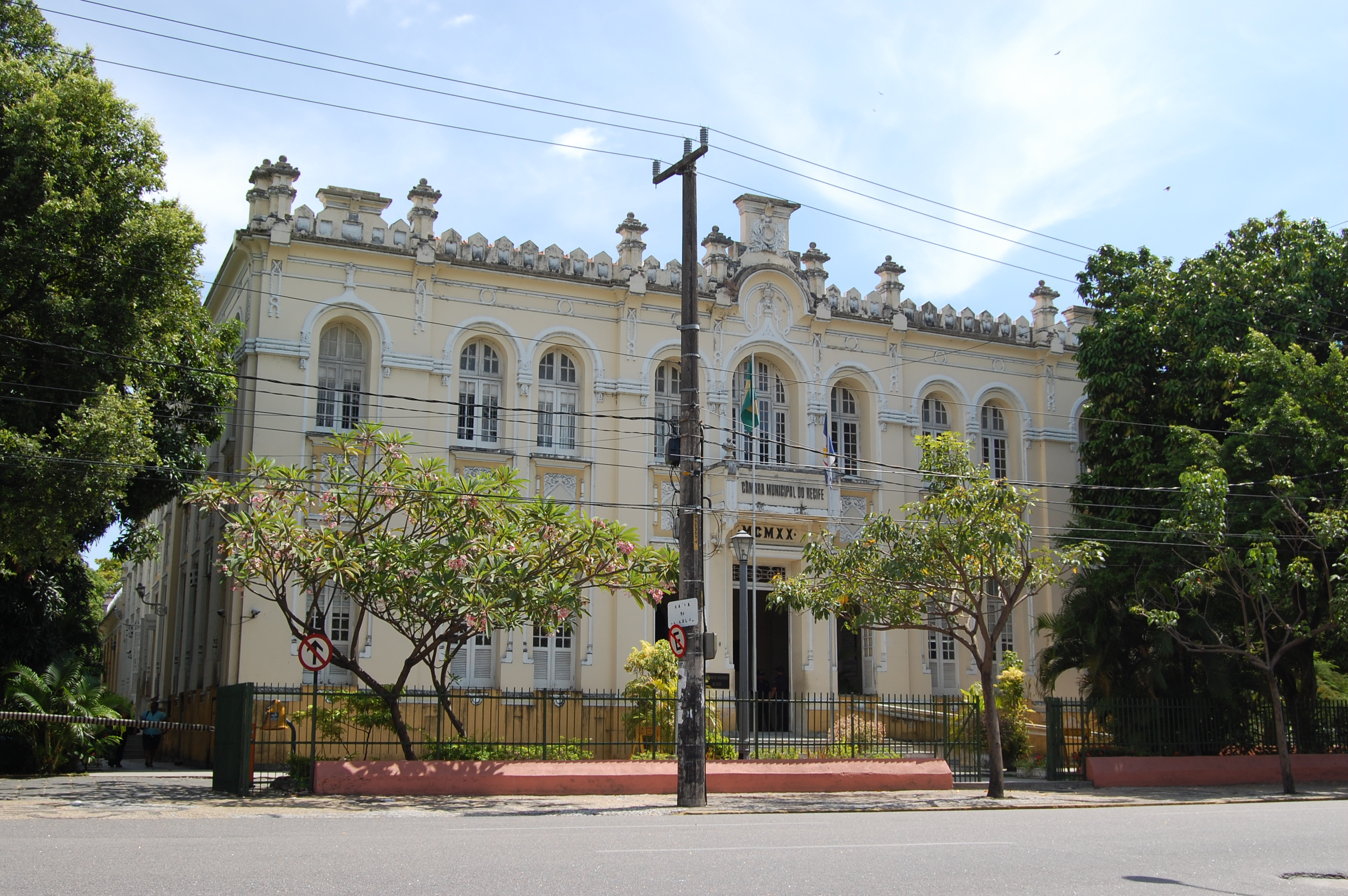 Edifício da Câmara Municipal de Recife.